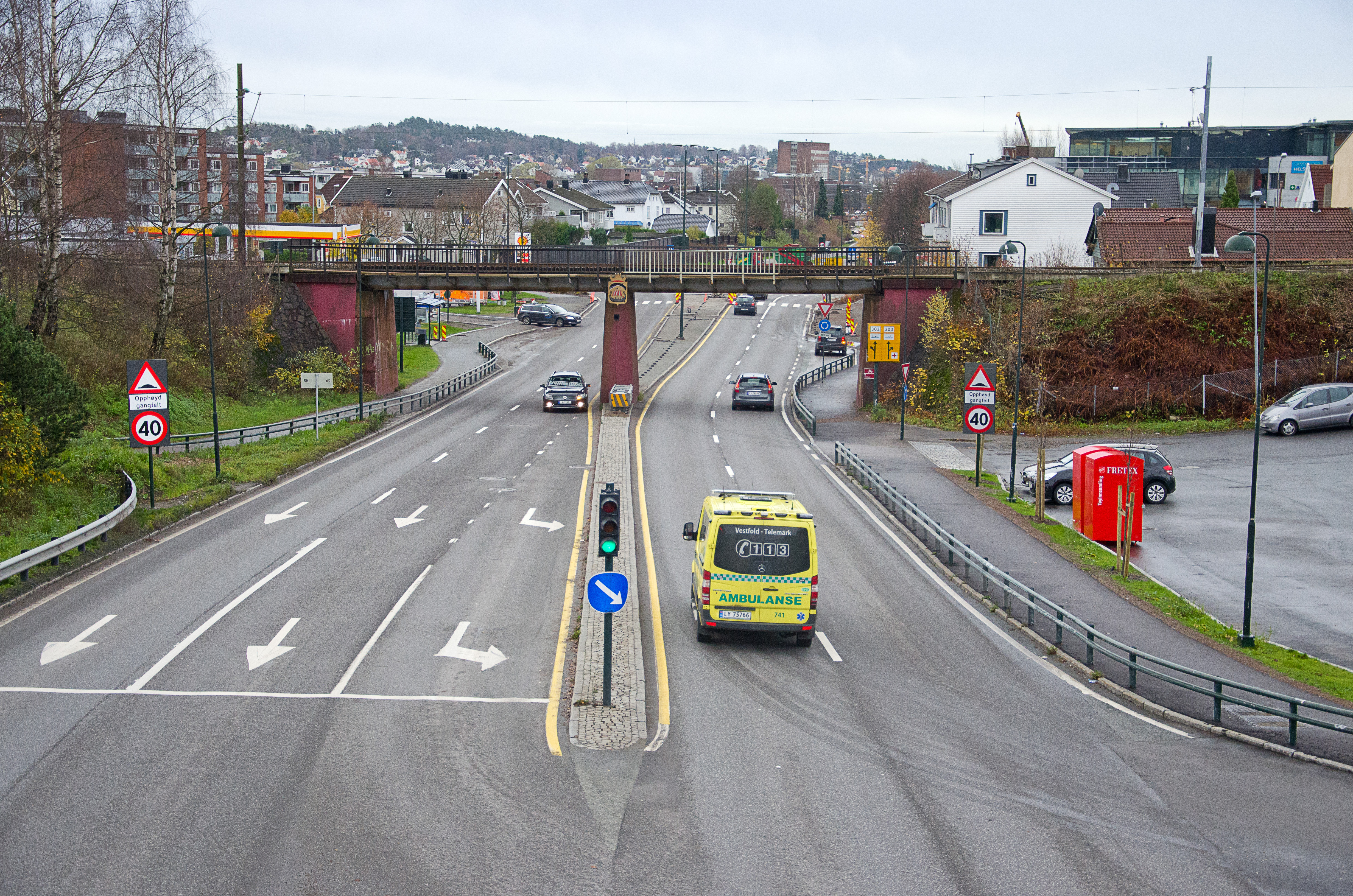 Vestfolds fylkesvei 305 Sandefjordsveien. Vestfoldbanen går på brua over veien.På bildet: Ambulanse, lyskryss, kjørefelt, kommunevåpen Sandefjord, Fretex tøyinnsamling, jernbanebru, trafikk